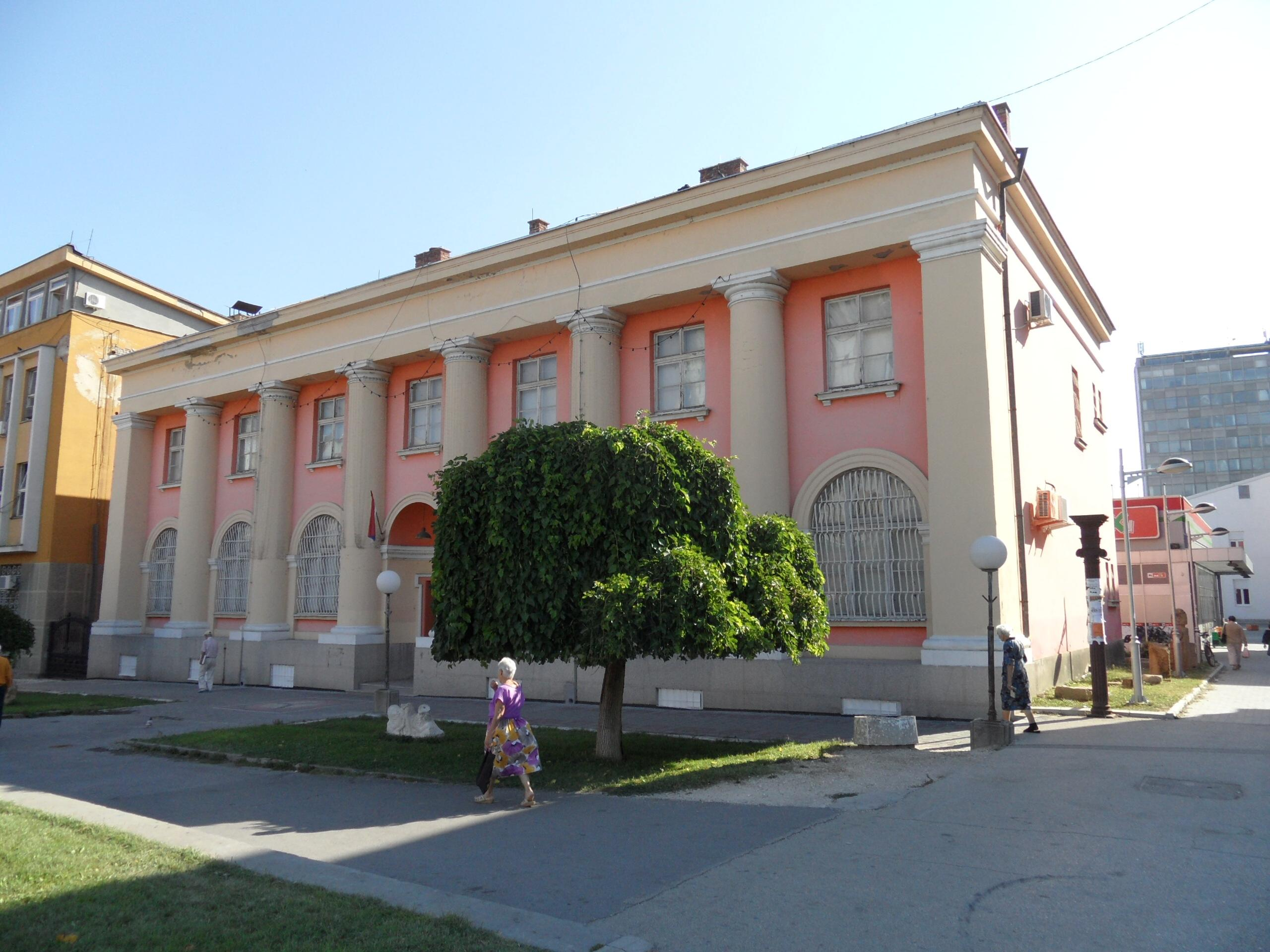 Narodni muzej u Zaječaru